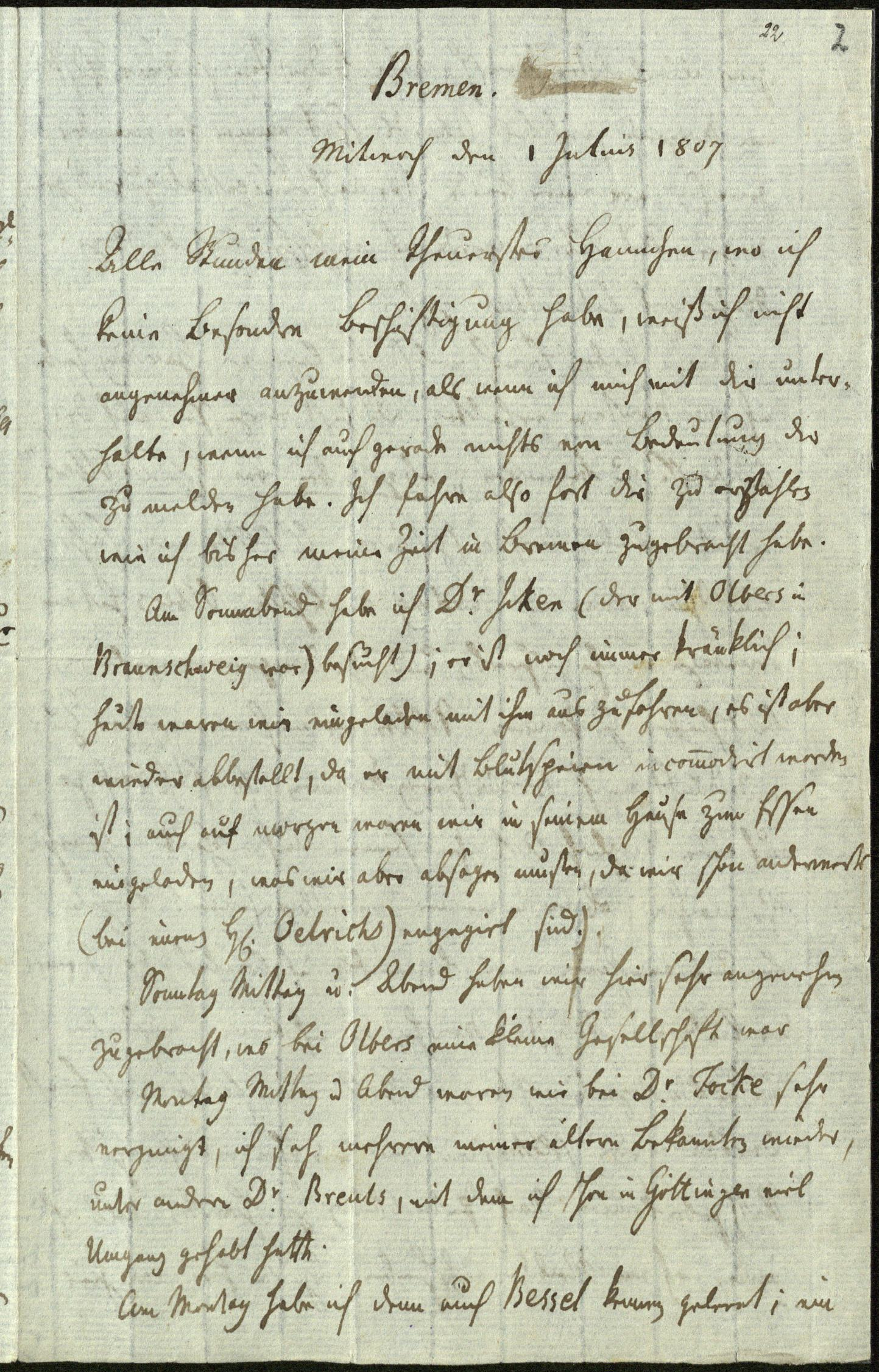 Brief von Carl Friedrich Gauss an seine Frau Johanna Gauß geb. Osthoff vom 1. Juli 1807, Seite 1 von 4.